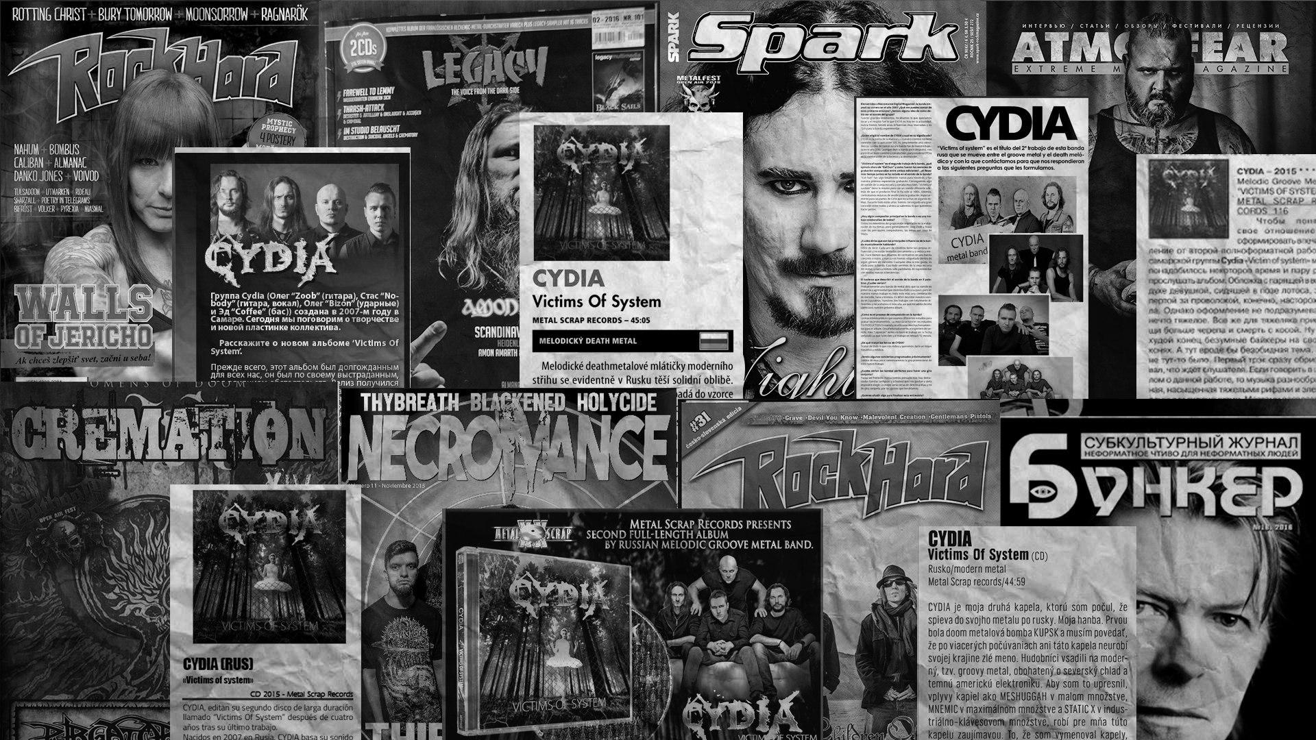 Cydia (World Reviews)